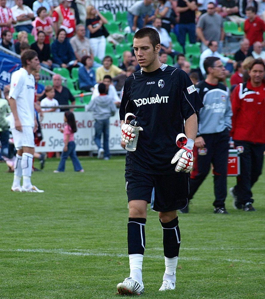 Simon Pouplin au SC Fribourg